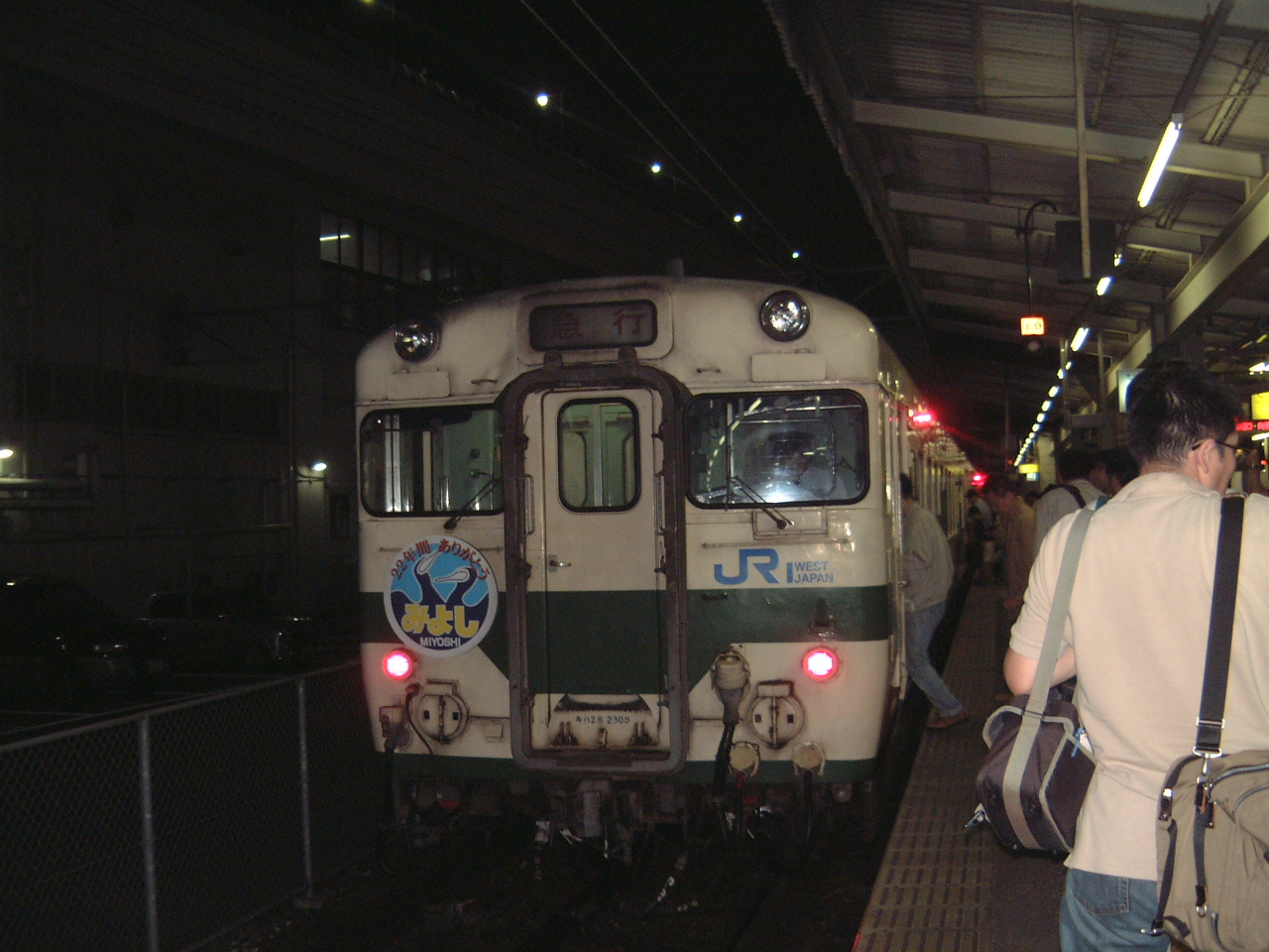 みよし号最終列車広島方